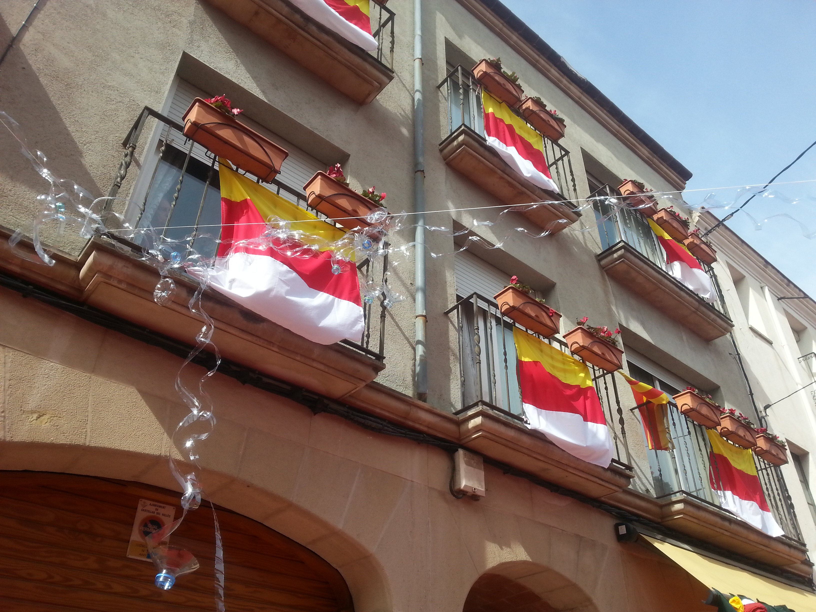 carrer major el dissabte de carnestoltes